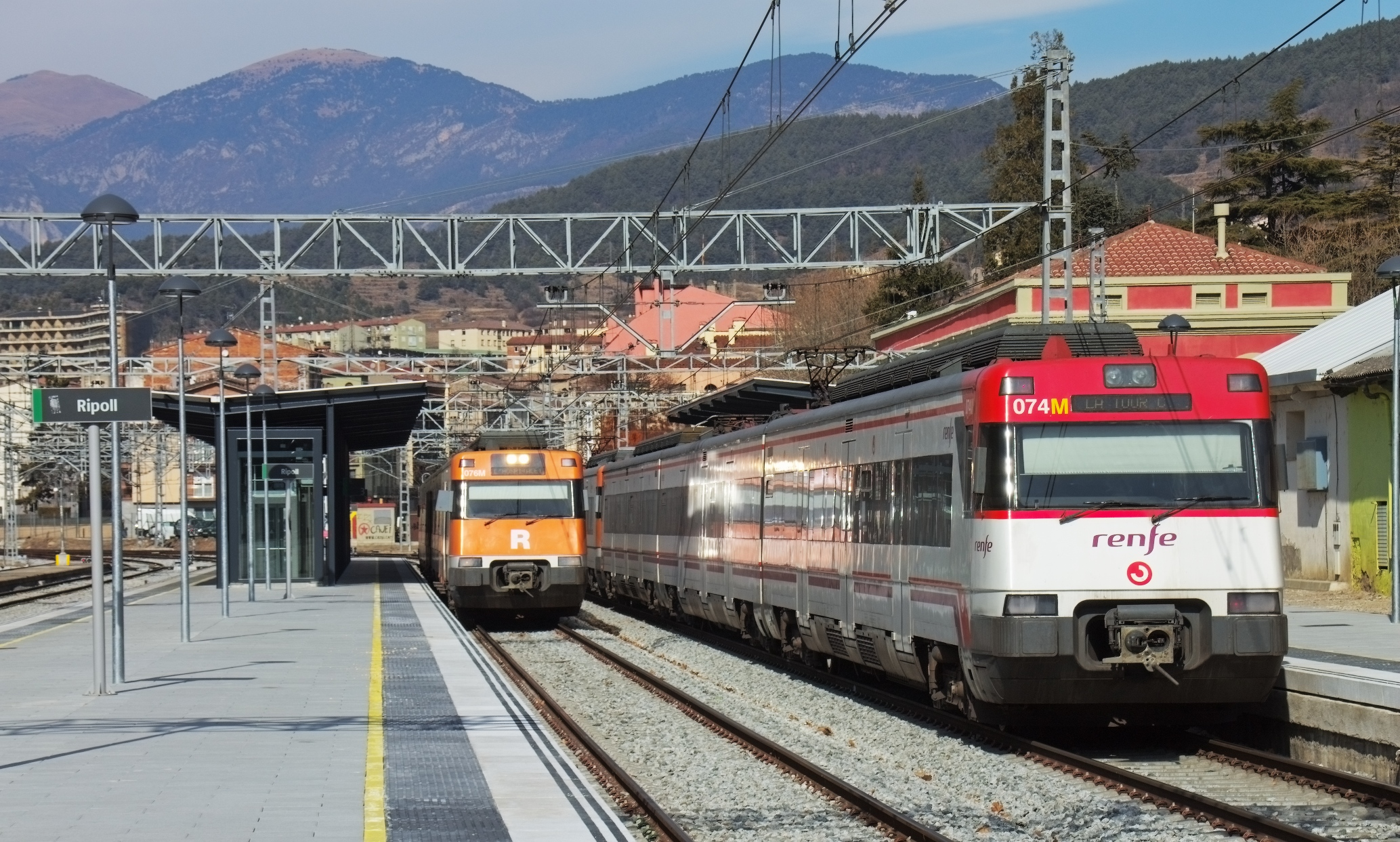 En esta vemos la 447-038R con un servicio hacia l'Hospitalet que estaba esperando el cruce con la 447-080R + 447-037R que iban hacia La Tour de Carol. En la estación de Ripoll, Catalunya.